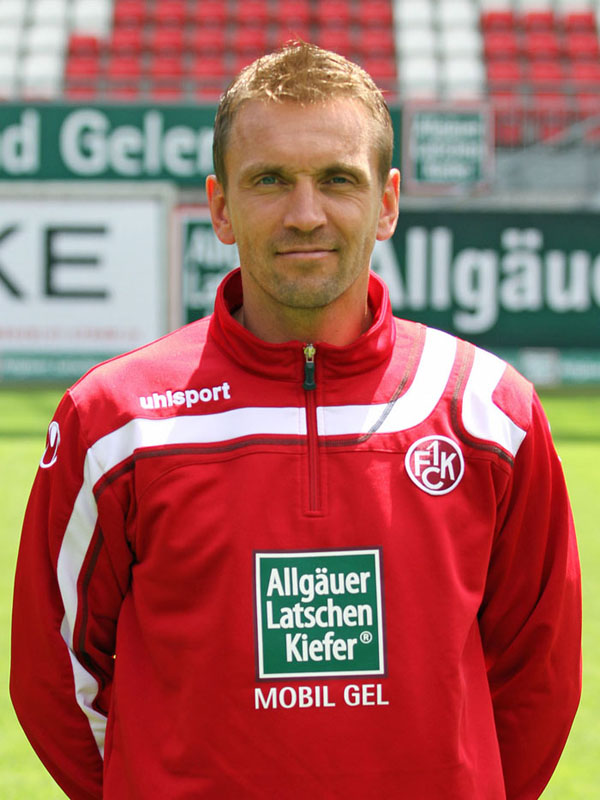 Oliver Schäfer, Fitnesstrainer des 1. FC Kaiserslautern